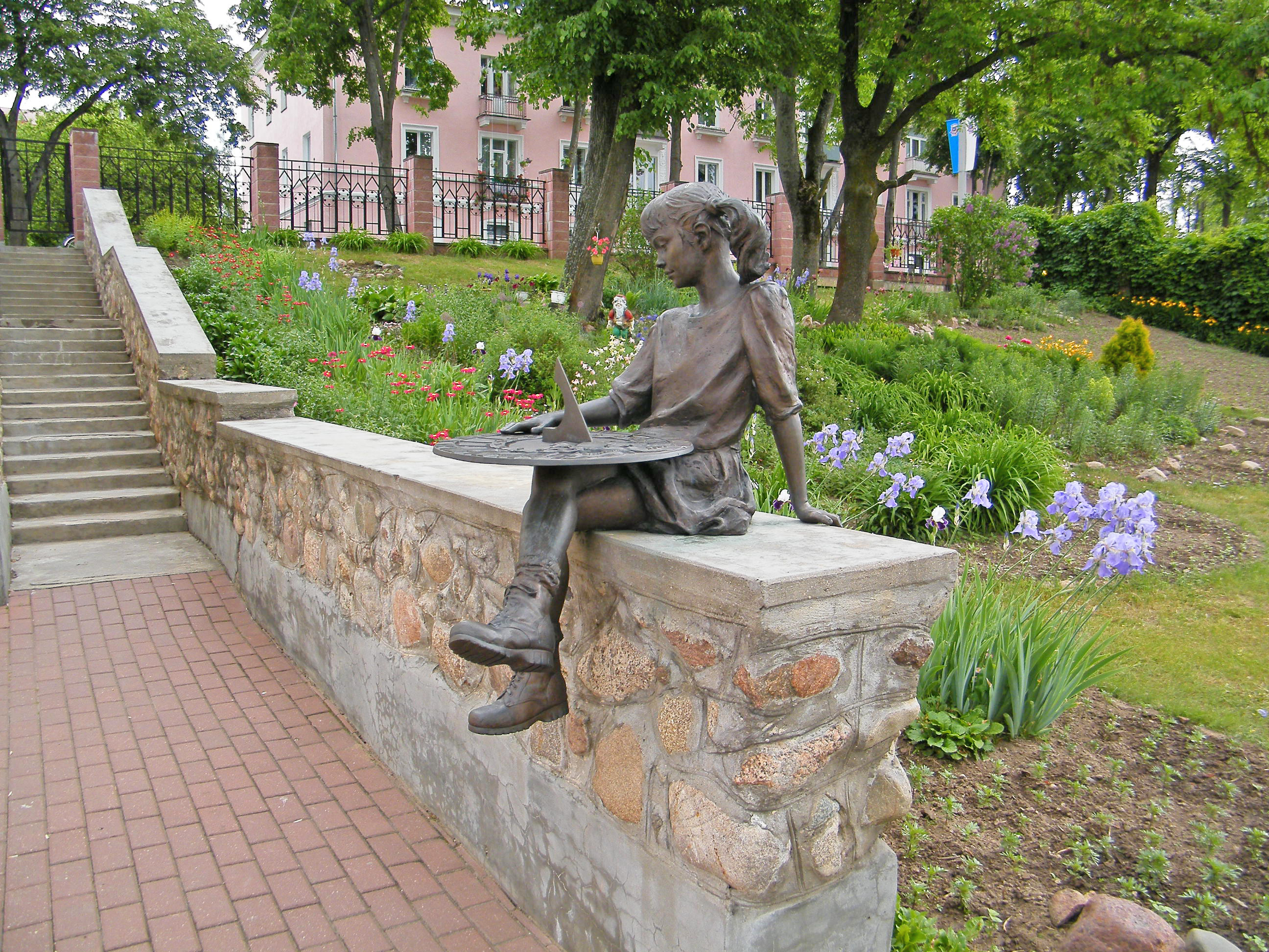 Скульптура девочки